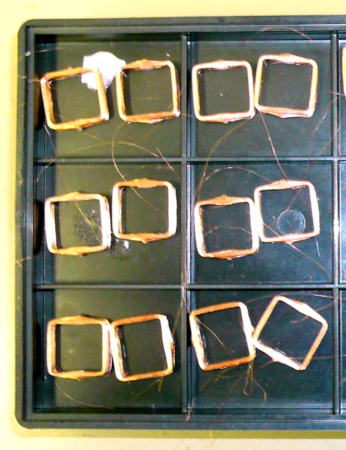 Elektrodinamikus wattmérő lengőtekercsek